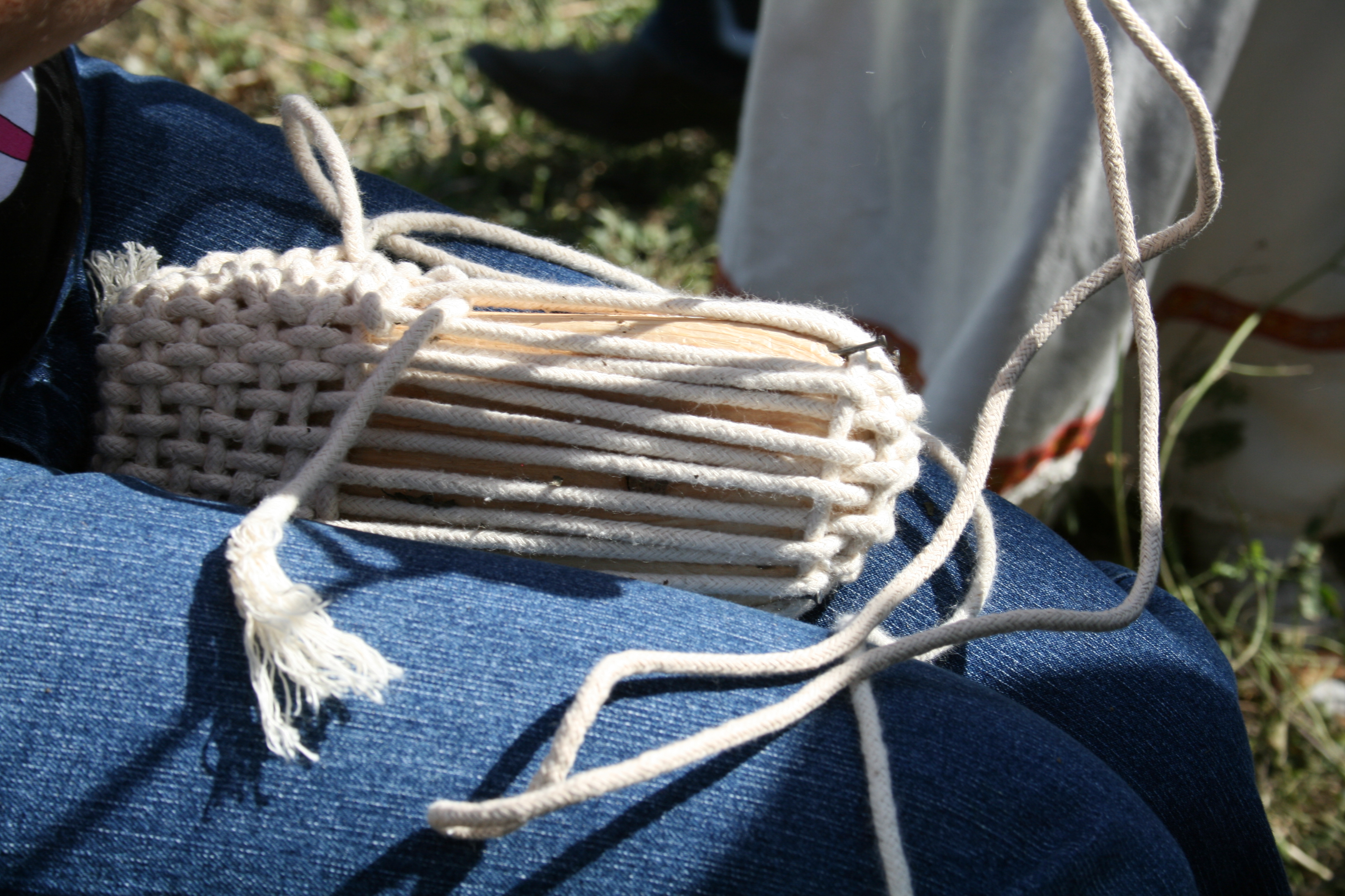 Урок по плетению лаптей в родовом экопоселении «Кореньские родники». Белгородская область.